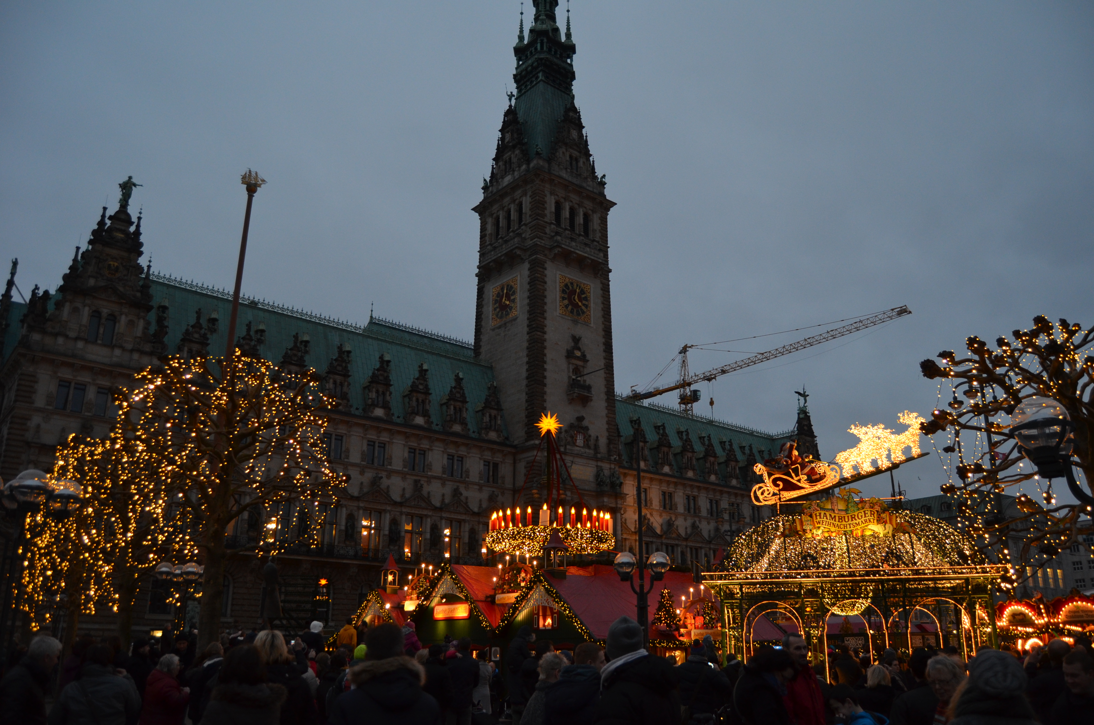 Christmas in Hamburg III